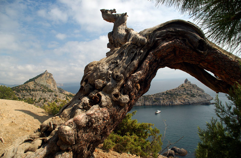 Голубая бухта, мыс Капчик, гора Сокол